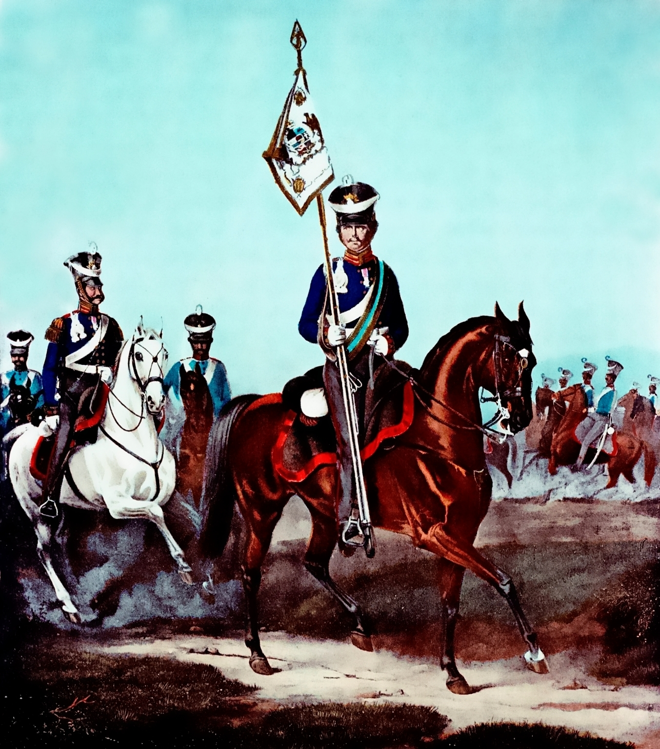 Mecklenburgisches Dragoner-Regiments, Dragoner mit Regiments-Standarte um 1844.